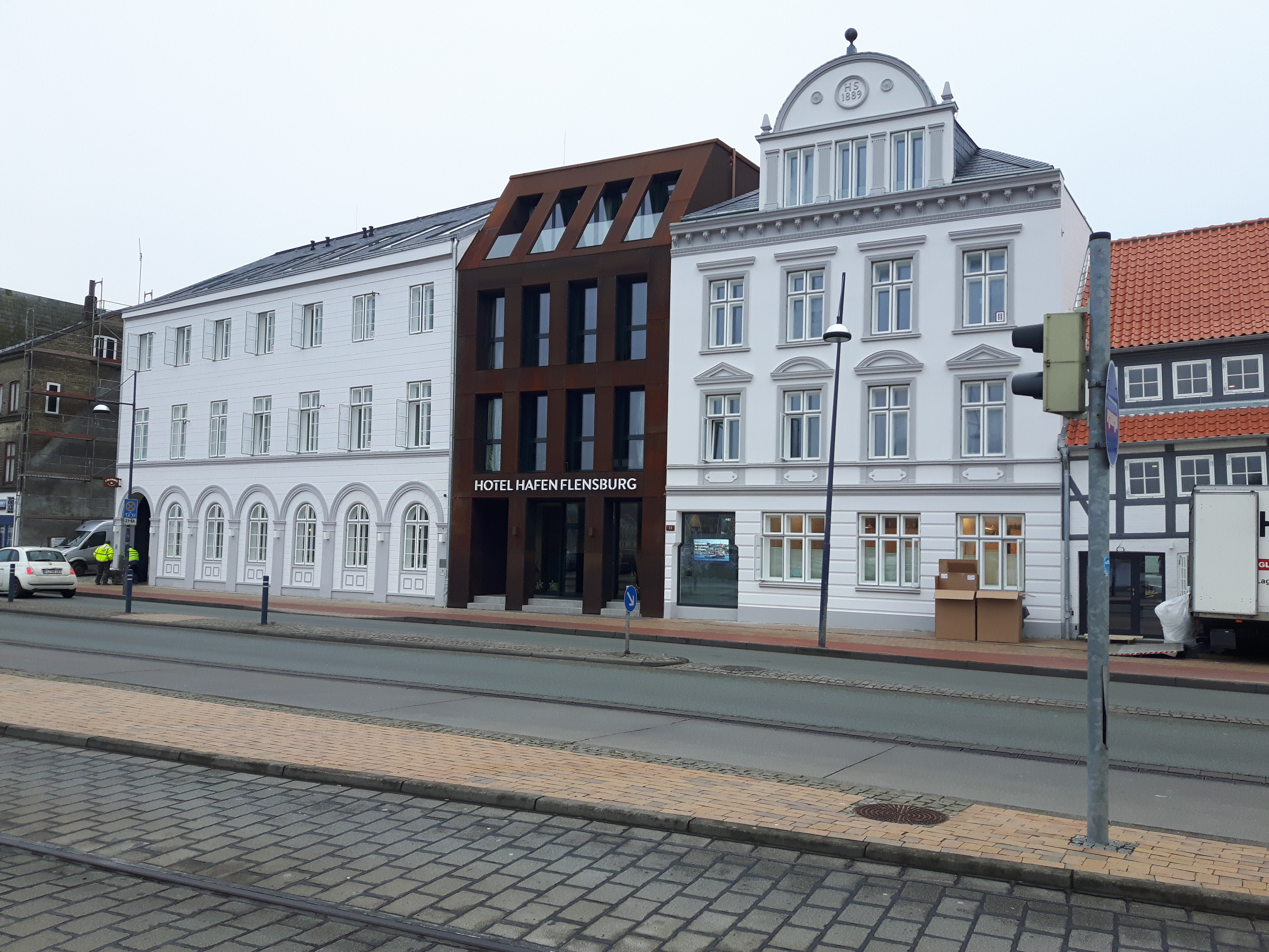 Hafenhotel Flensburg (ehemals Diskothek Speicher)